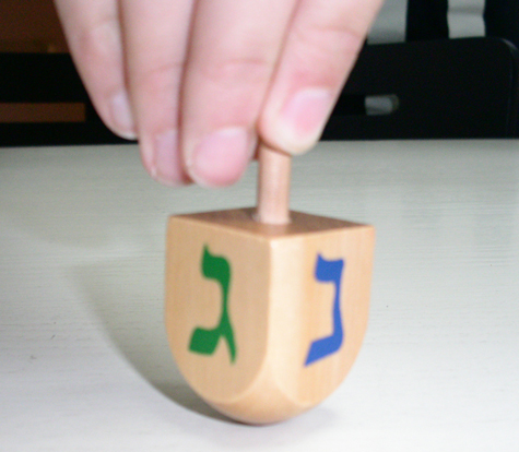 A Hanukkah dreidel.